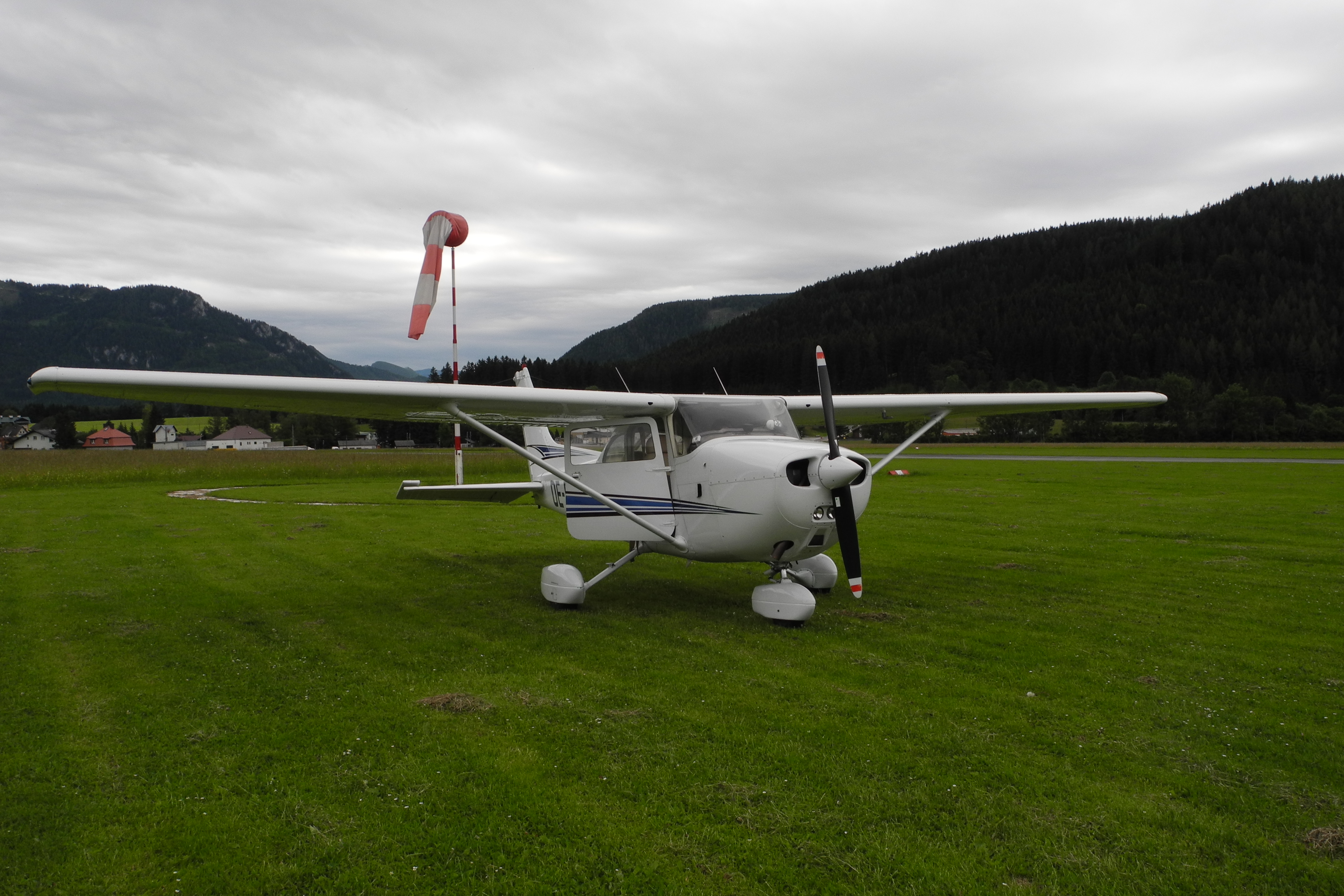 Cessna 172 in Mariazell VFR Ostösterreich